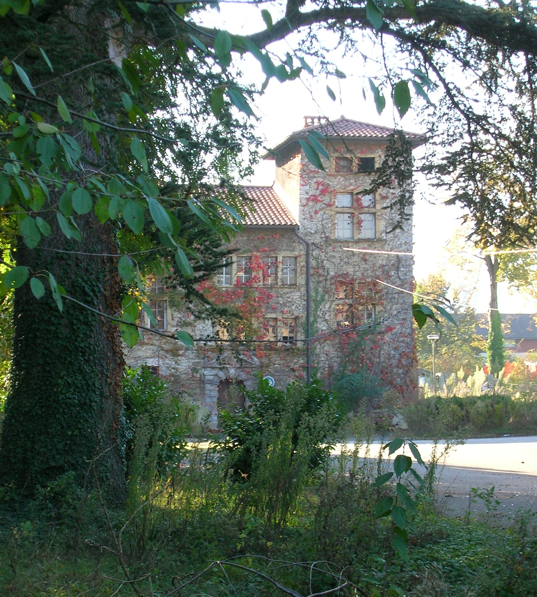 Château des Templiers, Échirolles, Isère, France.